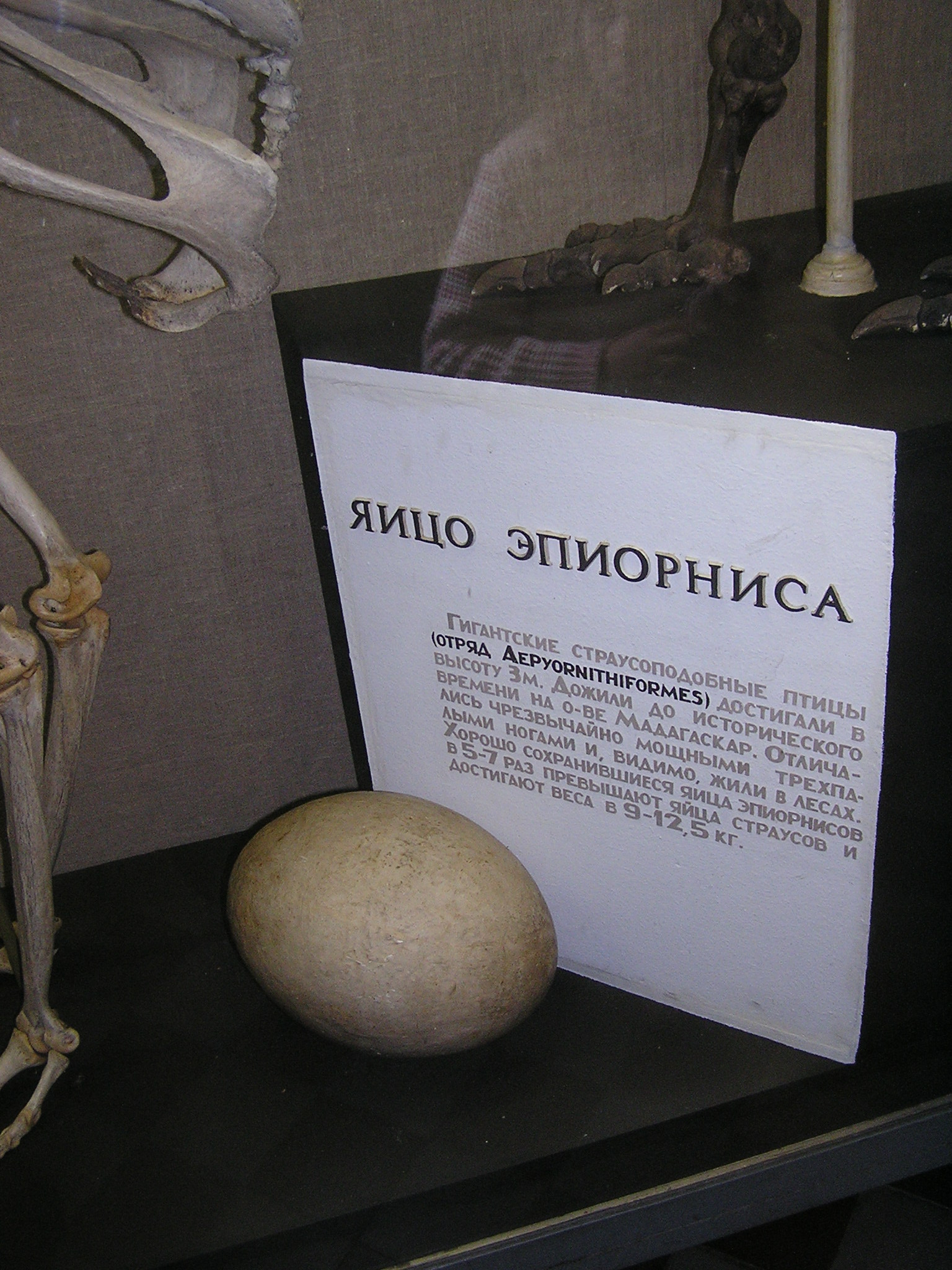 Зоологический музей в Санкт-Петербурге. Яйцо эпиорниса